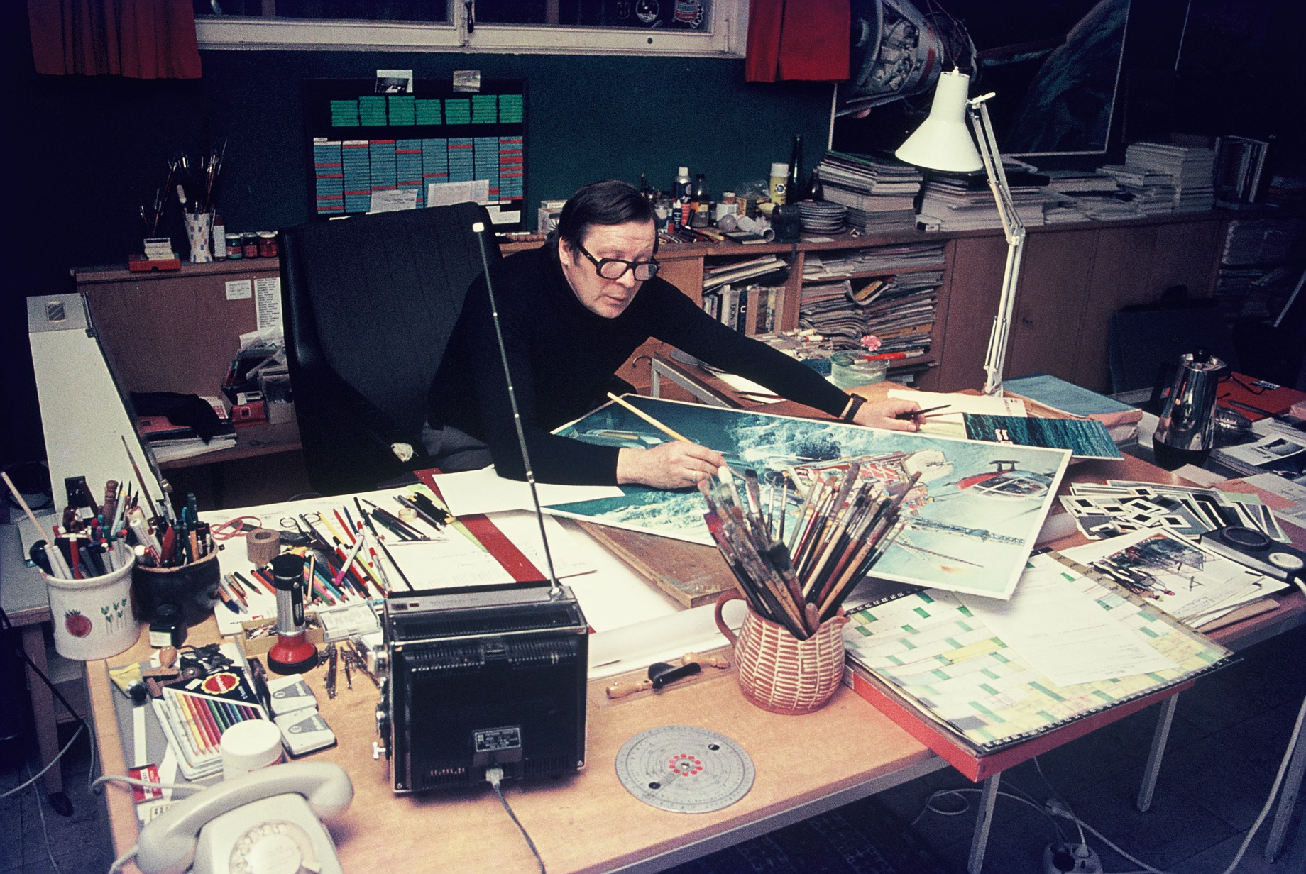 Radtke arbeitet in seine Atelier zu Hause in Uetze. Auf diesem Bild ist eine Offshore Bohrplattform abgebildet die von Hubschraubern angeflogen wird.